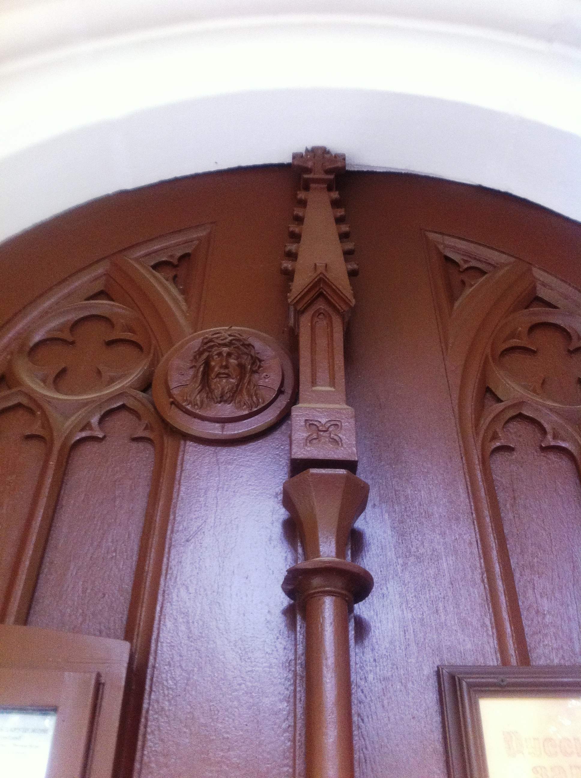 Церковь Покрова Пресвятой Богородицы (Регенсбург) - элемент резьбы по дереву на двери храма